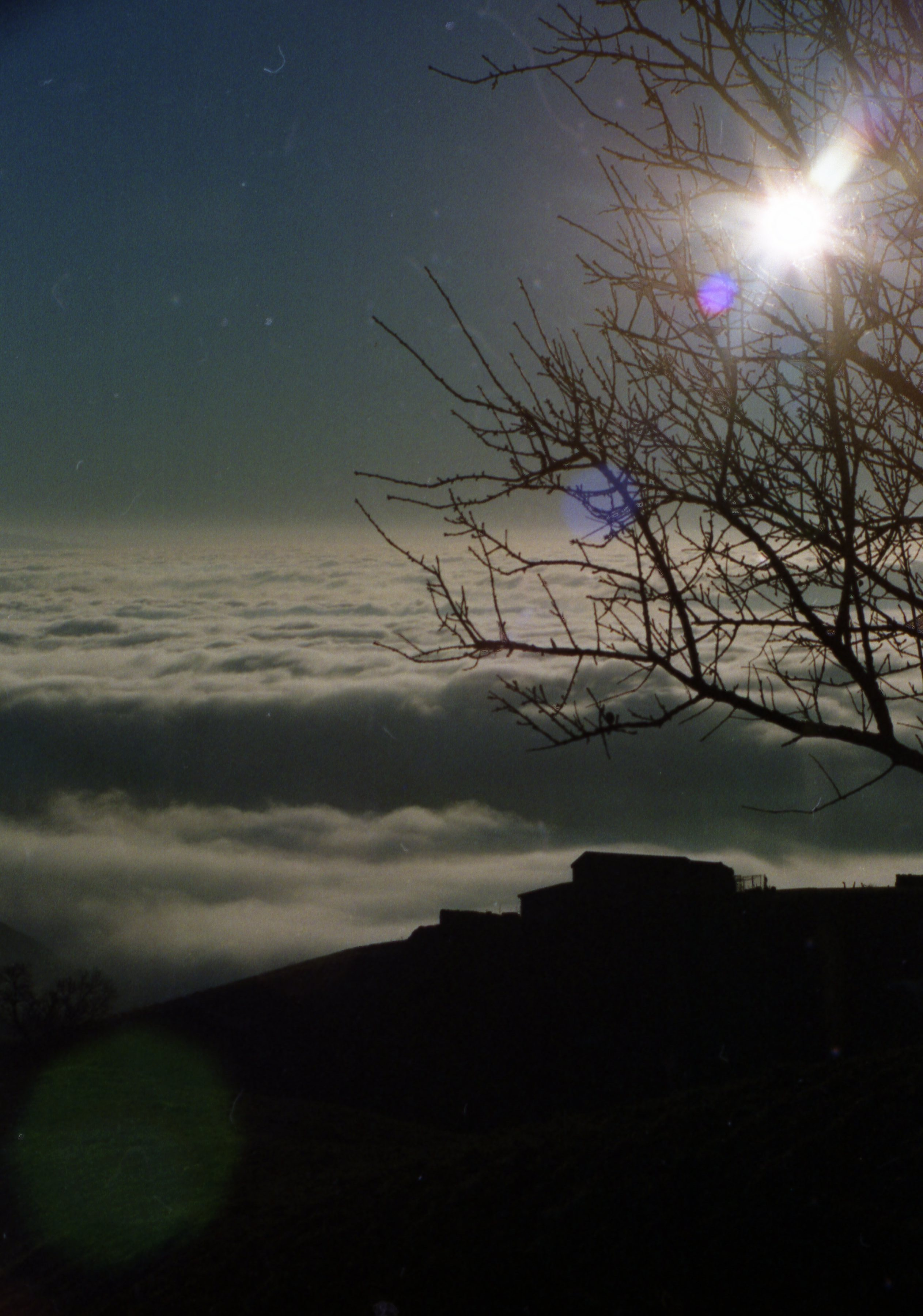 Il sole invernale sopra le nuvole